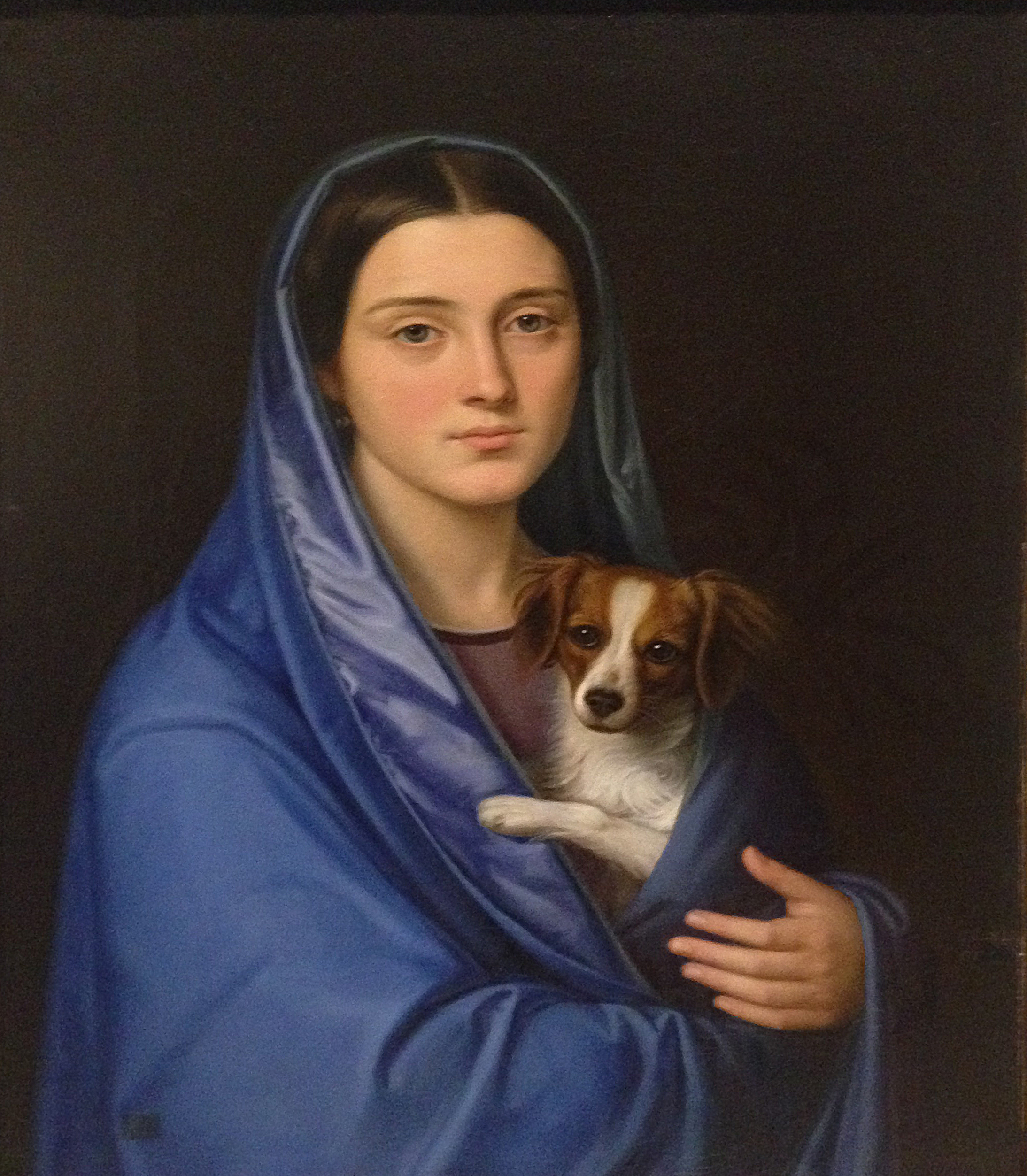 Ritratto della nipote Clementina - Giuseppe Gandolfo 1835